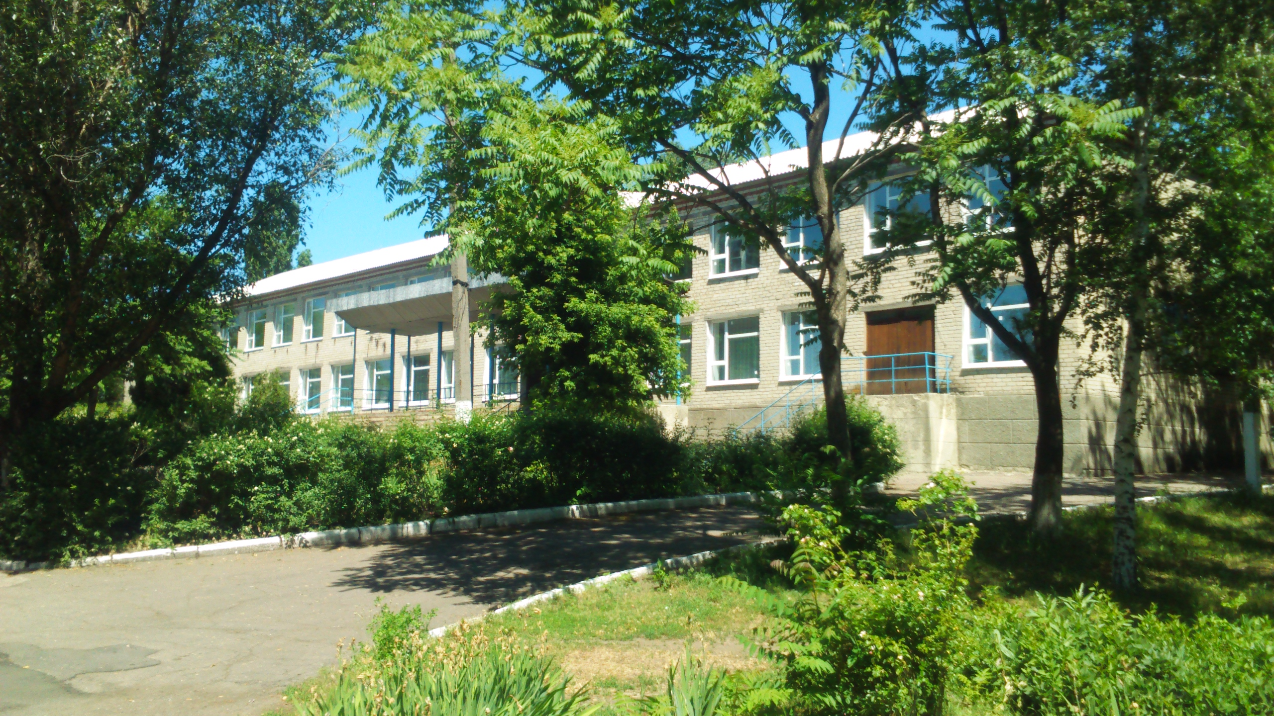 Добропі́лля — село в Україні, Добропільському районі Донецької області, над річкою Водяна.